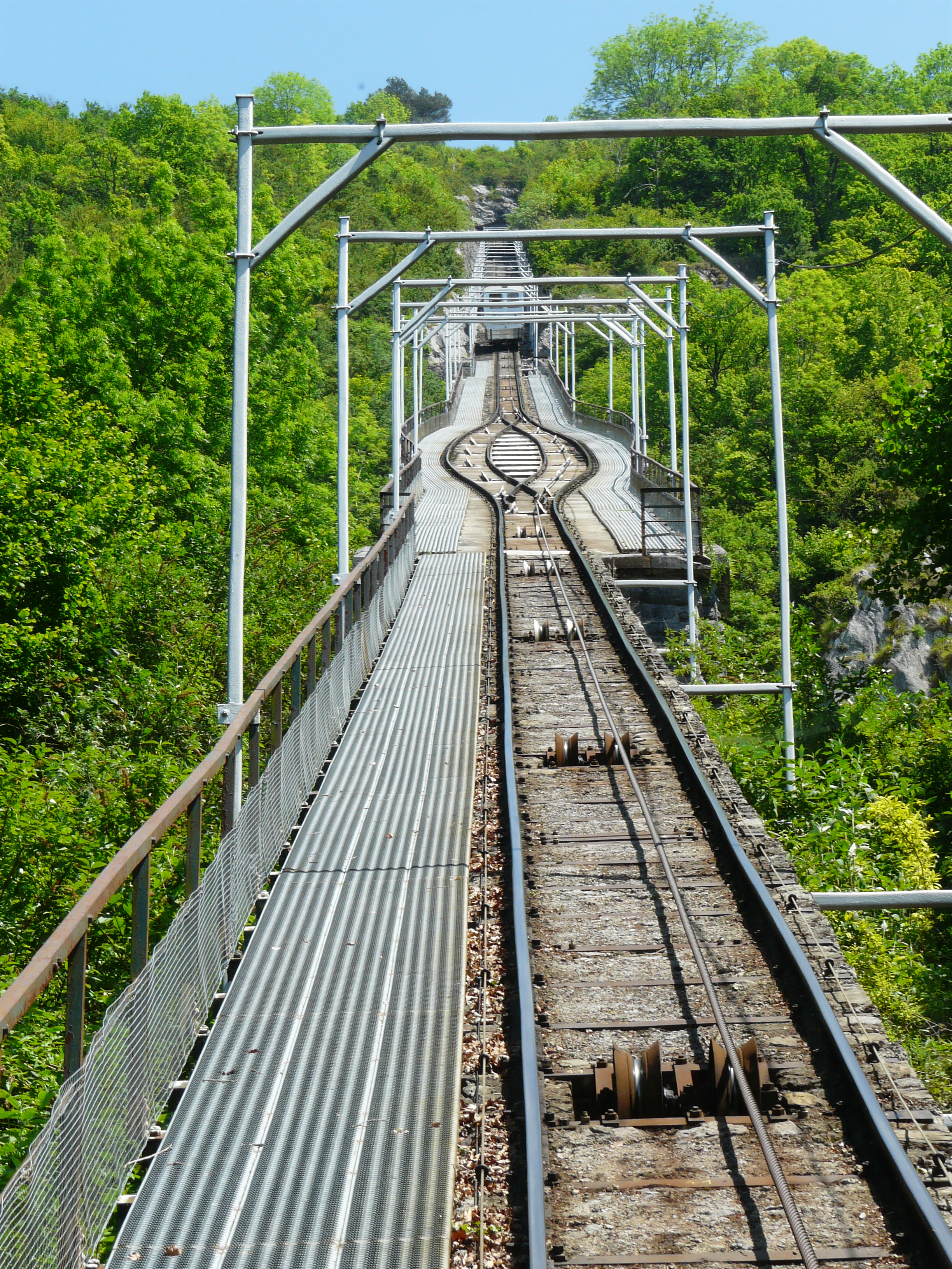 Zone de croisement du Funiculaire du Pic du Jer, Lourdes, Hautes-Pyrénées, France.